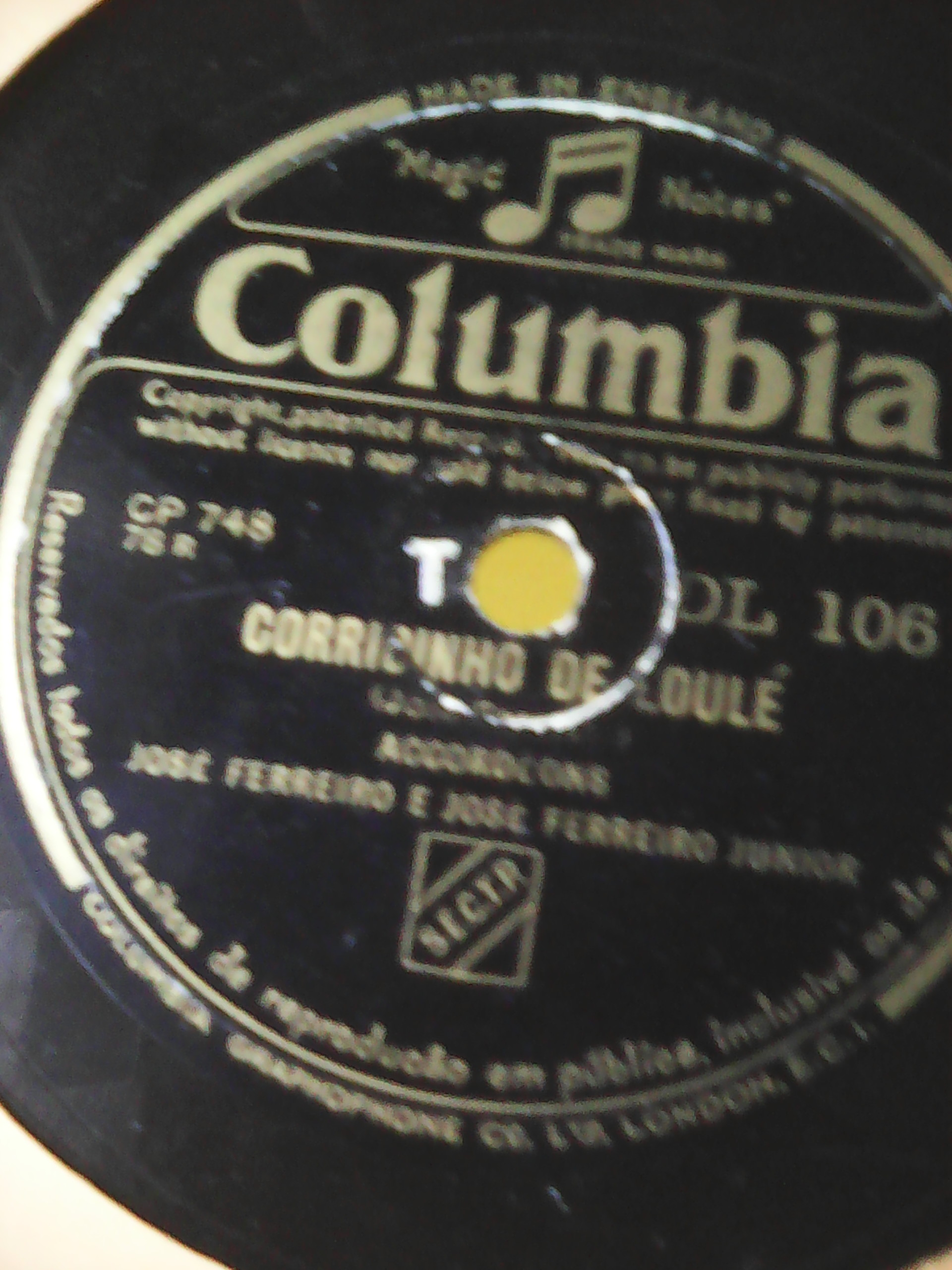 Disco de 78 rotações Corridinho de Loulé,da autoria de José Ferreiro,por José Ferreiro e José Ferreiro Júnior